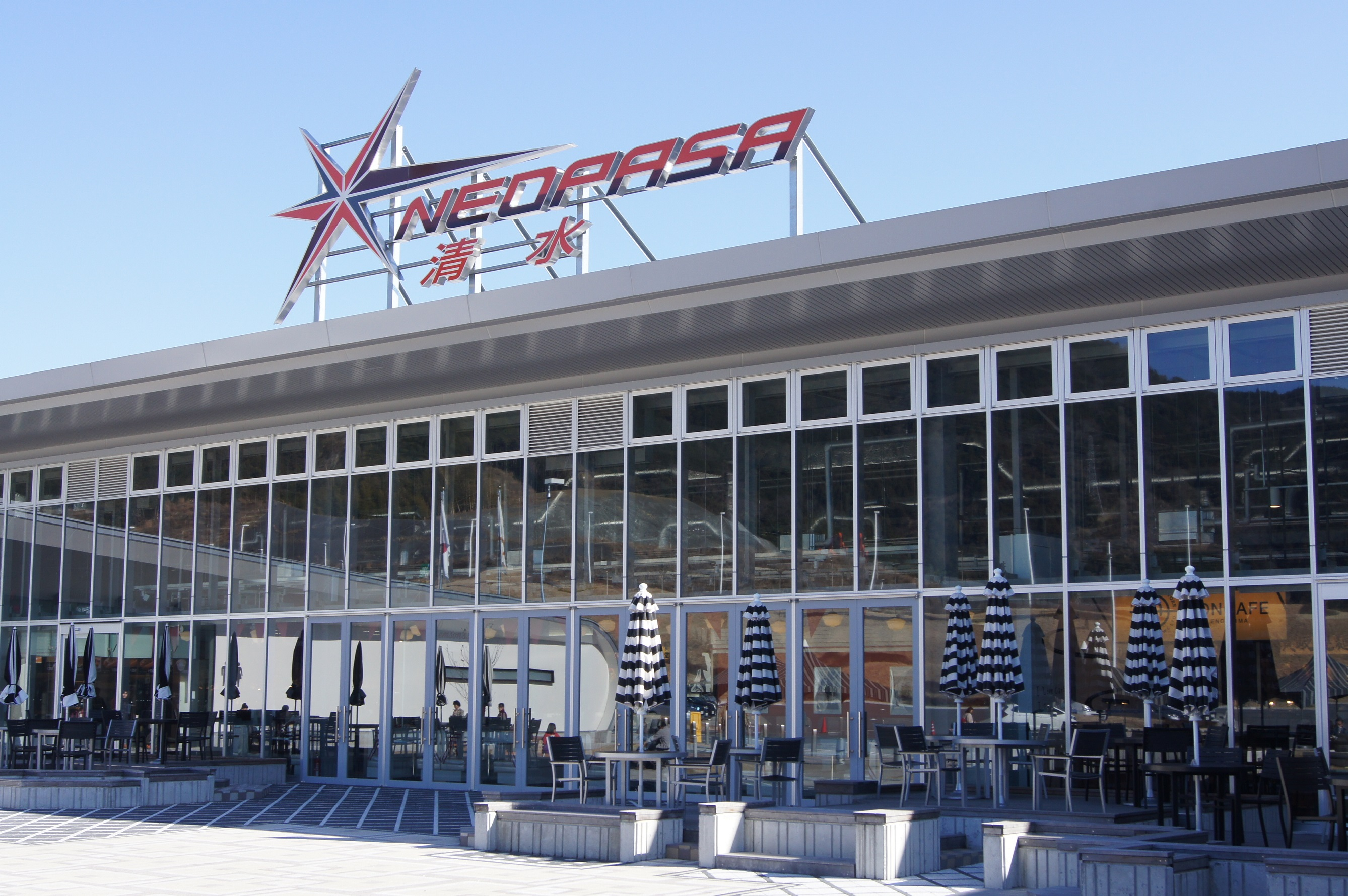 清水パーキングエリア